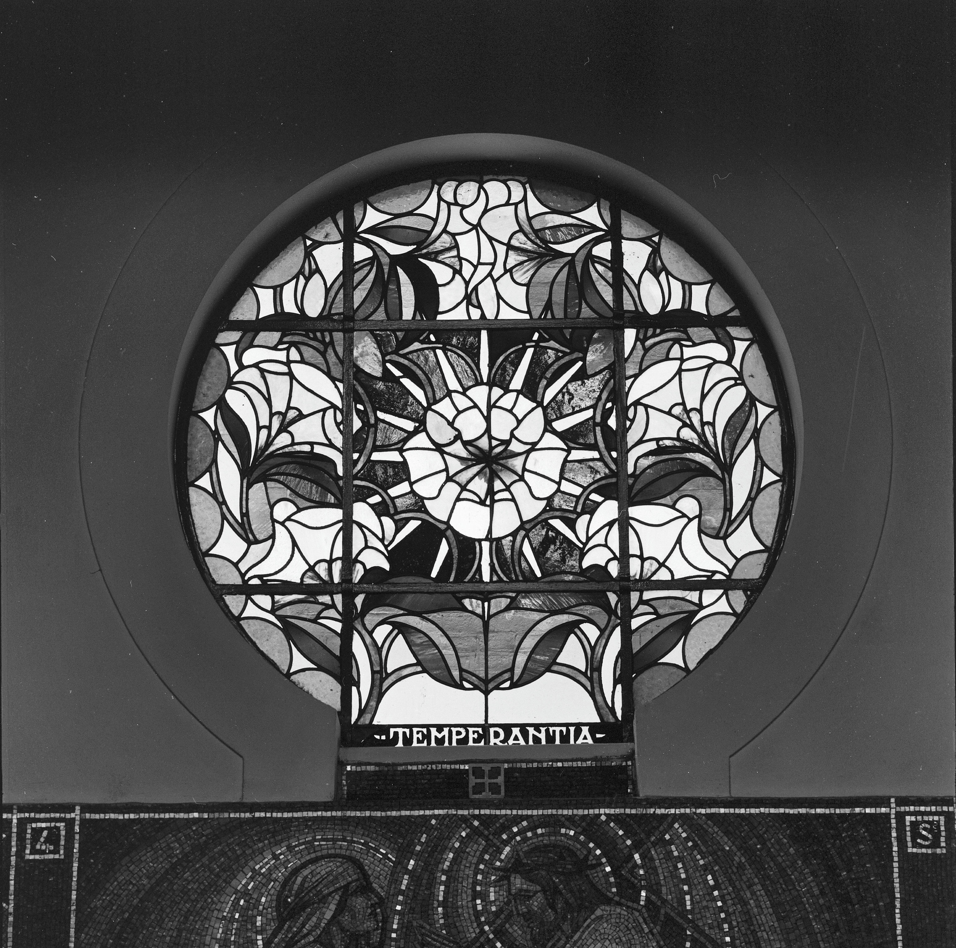 Rooms-katholieke Sint-Antonius Abtkerk: Interieur, aanzicht gebrandschilderd glas-in-loodraam (opmerking: Gefotografeerd voor Glas in lood in Nederland 1817-1968)